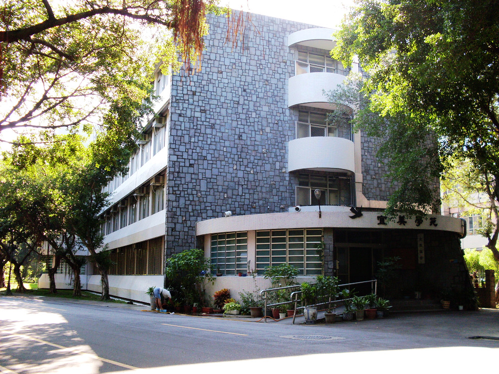 輔大宜美宿舍